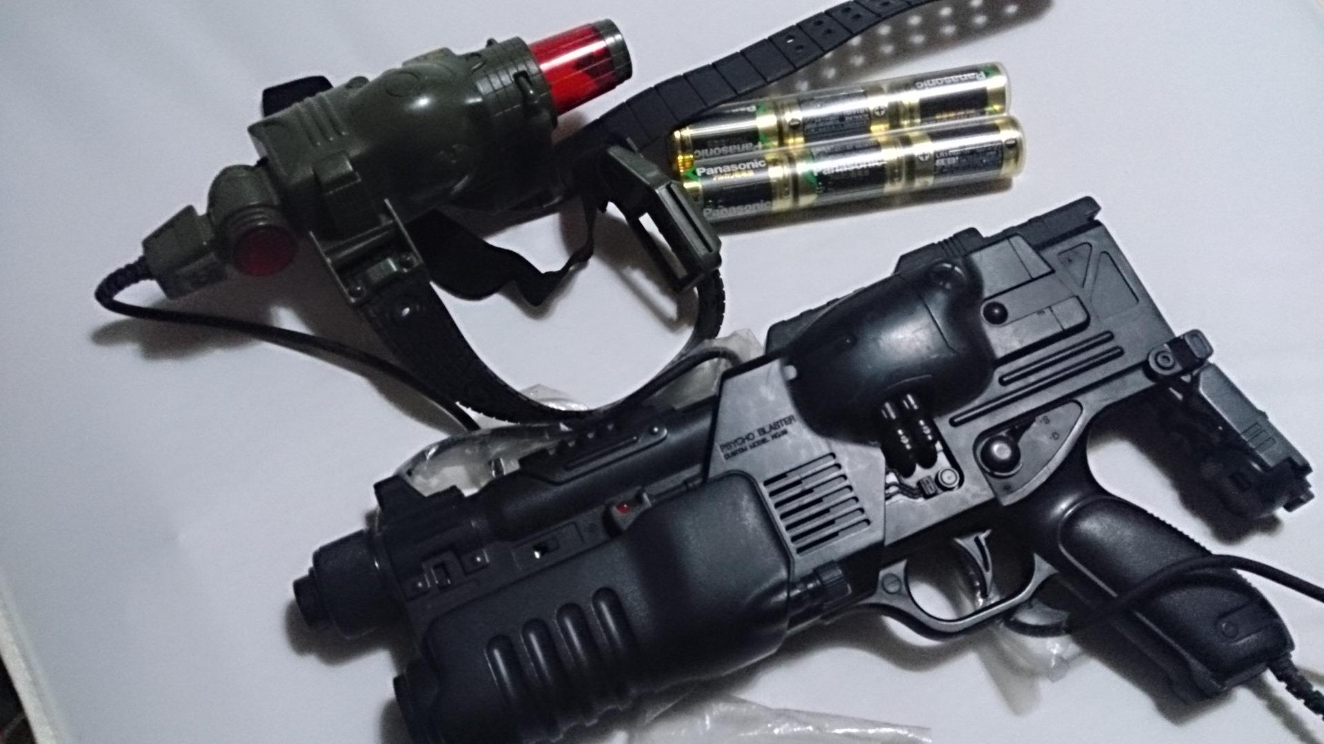 トミーから販売されていた光線銃の玩具